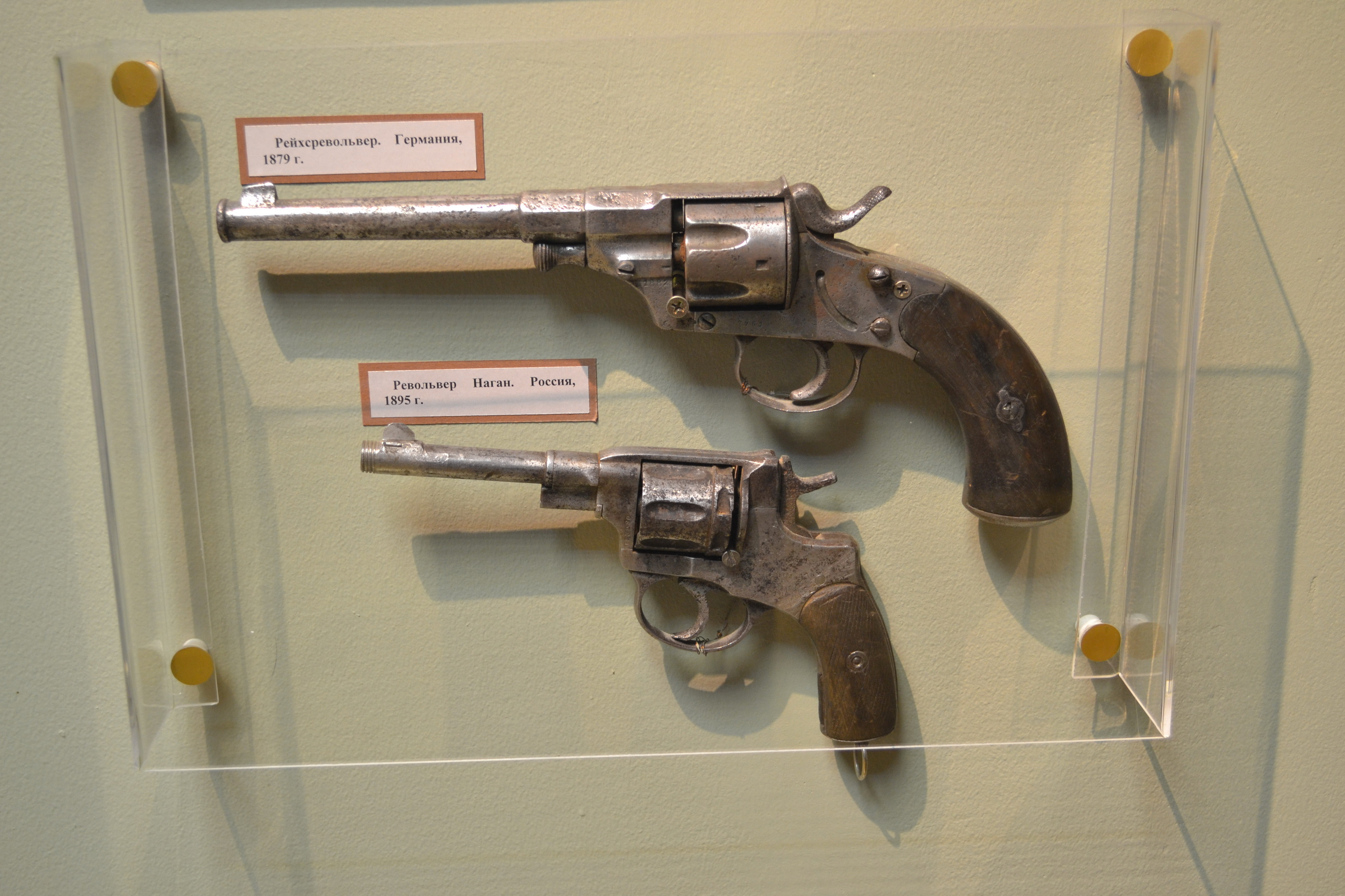 Беларуская (тарашкевіца): Вікісустрэча ў Менску 17 траўня 2014